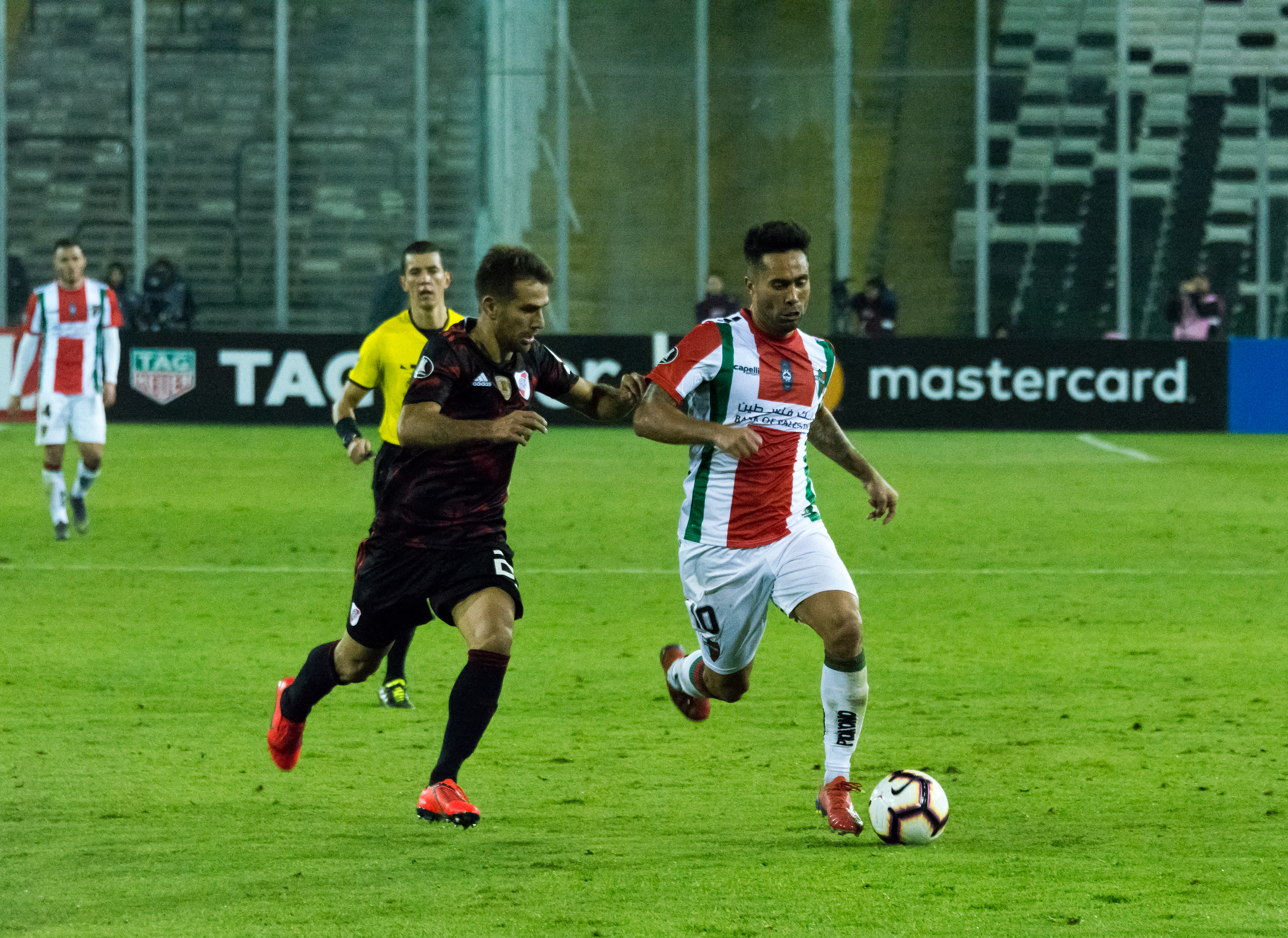 Palestino v River Plate, Estadio Monumental, Macul, Santiago, Región Metropolitana, Chile.